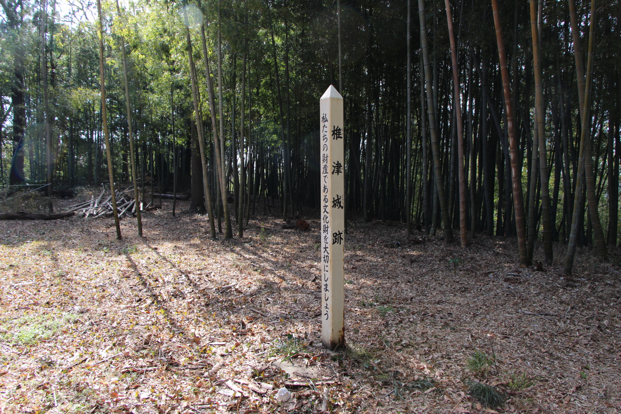 椎津城 主郭内標柱